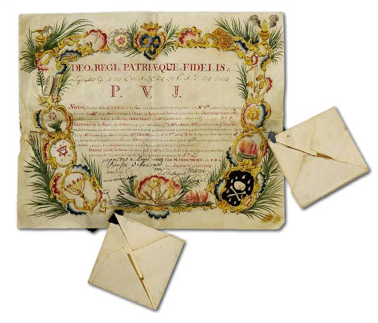 Parchemin sur velin peint, daté de 1766 par lequel la loge La Parfaite Harmonie, relevant des loges de la marine de Rochefort et Toulon (qui sont pratiquement jumelées), atteste que le Frère Villeneuve a reçu « par intervalles » les grades de Maître en Azur, Elu par 3 fois 15 et de Grand Ecossais. (Musée de la FM, Coll GODF) ""